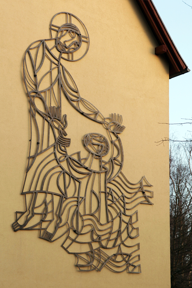 Wandbild aus Schmiedeeisen von Werner Juza am Wiesenhaus im Sächsischen Epilepsiezentrum Radeberg